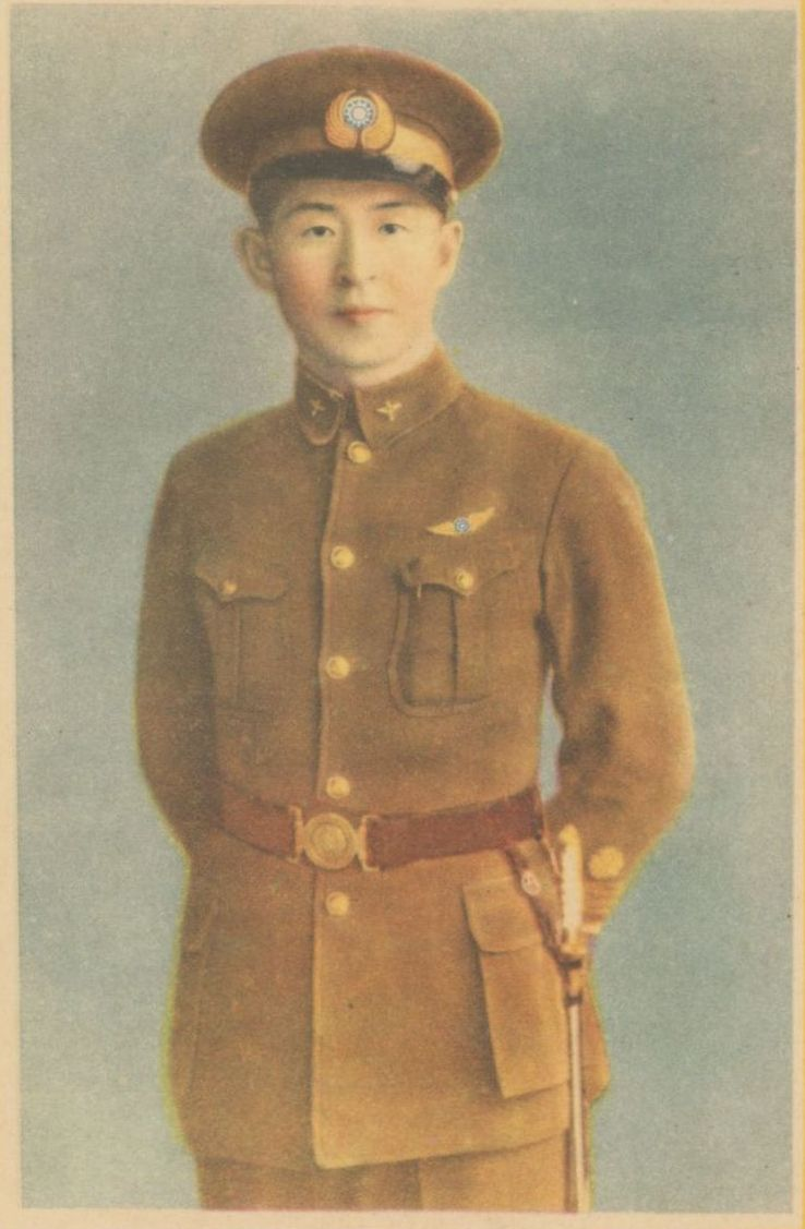 中文（中国大陆）: 中國空軍抗戰史畫插圖